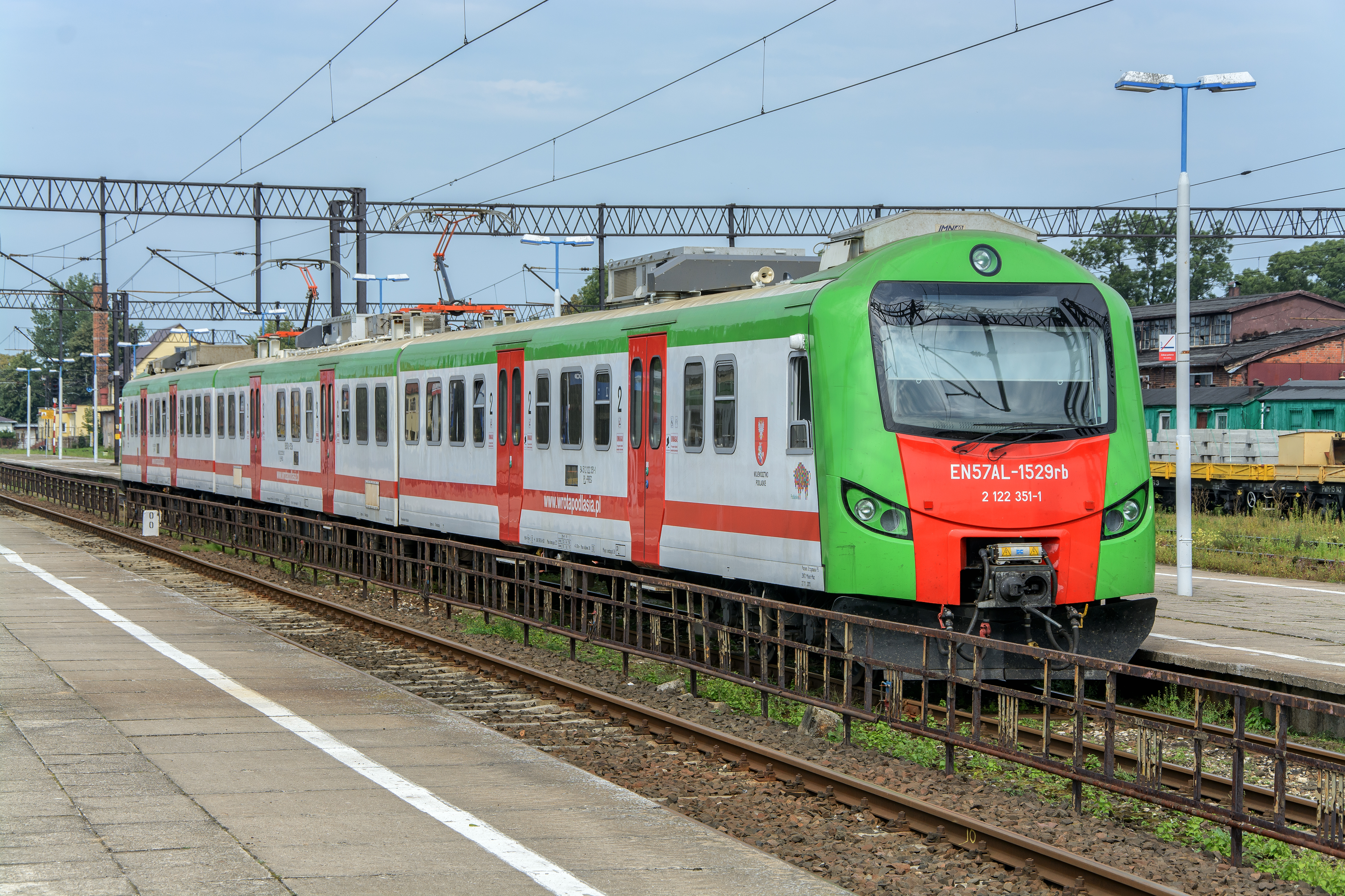 Elektryczny zespół trakcyjny EN57AL-1529 stoi na stacji Ełk.